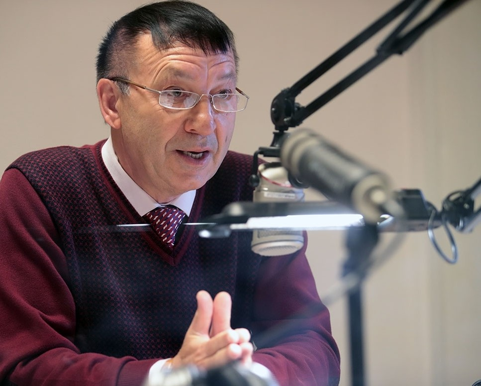 Татарча/tatarça: Тәлгат Хамматшин лаеклы ялга китү алдыннан интервью бирә